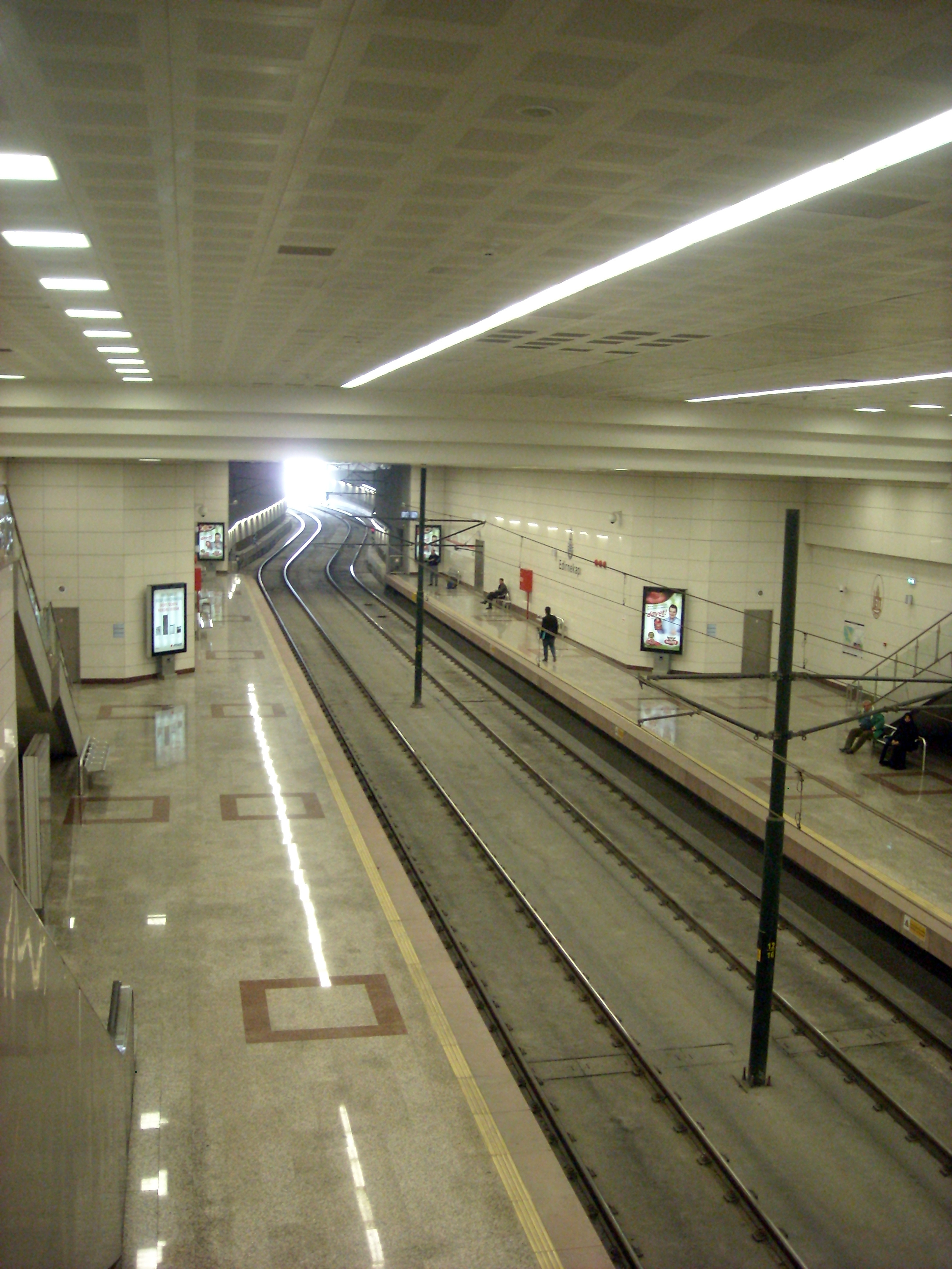 Edirnekapı tram stop